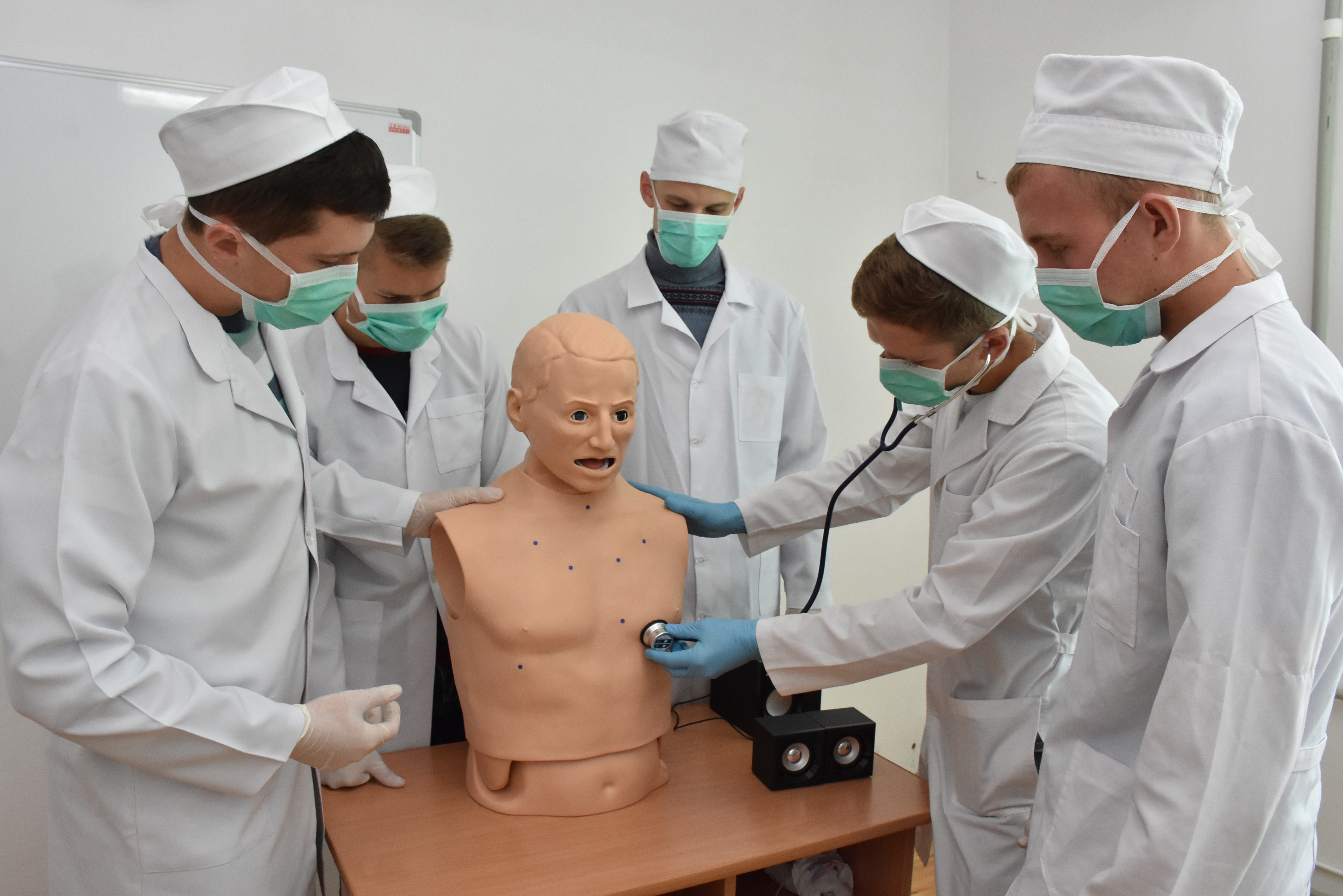 Студенти на заняттях у центрі симуляційного навчання Тернопільського державного медичного університету імені І. Я. Горбачевського.